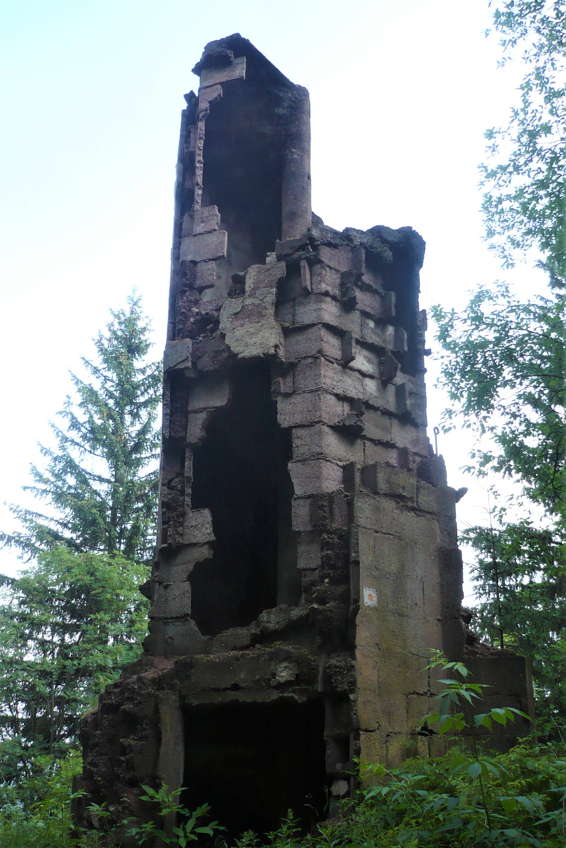 Włodzicka Góra, wieża widokowa.